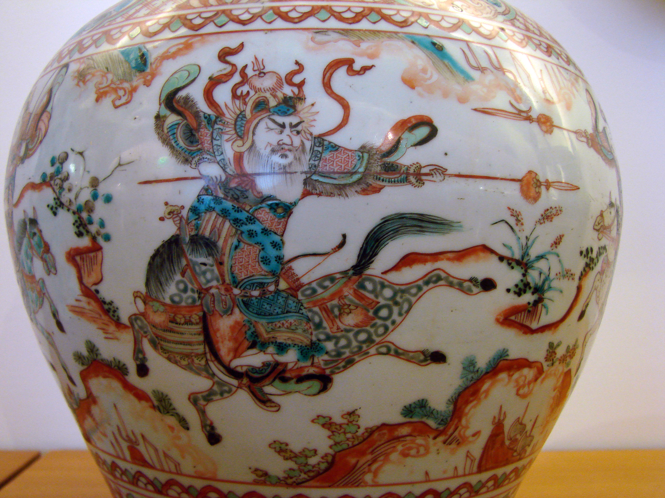 Jarre à décor de cavaliers. Dynastie Ming, période jiajing (1522-1566). Musée Guimet, Paris.